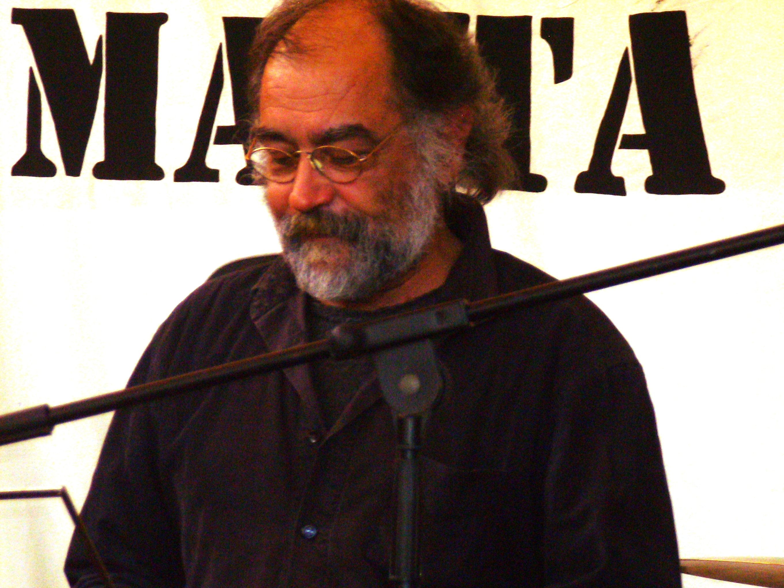 José Medeiros, convidado, na Escola Básica e Secundária de Santa Maria (Vila do Porto, ilha de Santa Maria, Açores), como parte do evento "Festejar Abril em Maio" promovido pelo Clube Asas do Atlântico.